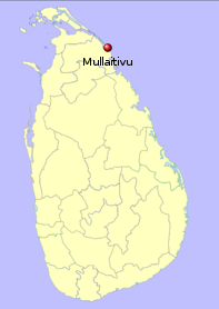 Localización de Mullaitivu en Sri Lanka.